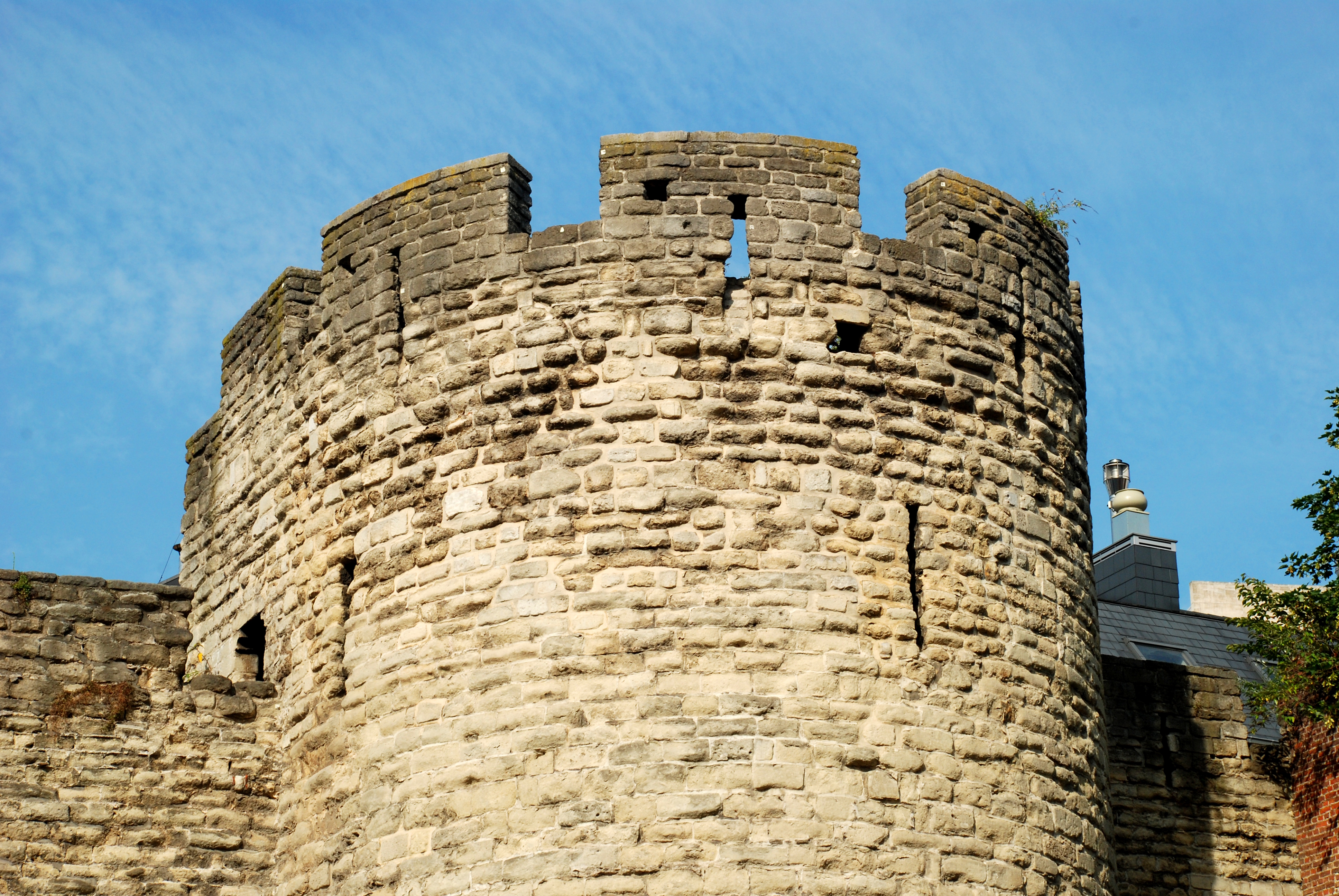 Belgique - Bruxelles - Tour Saint-Jacques